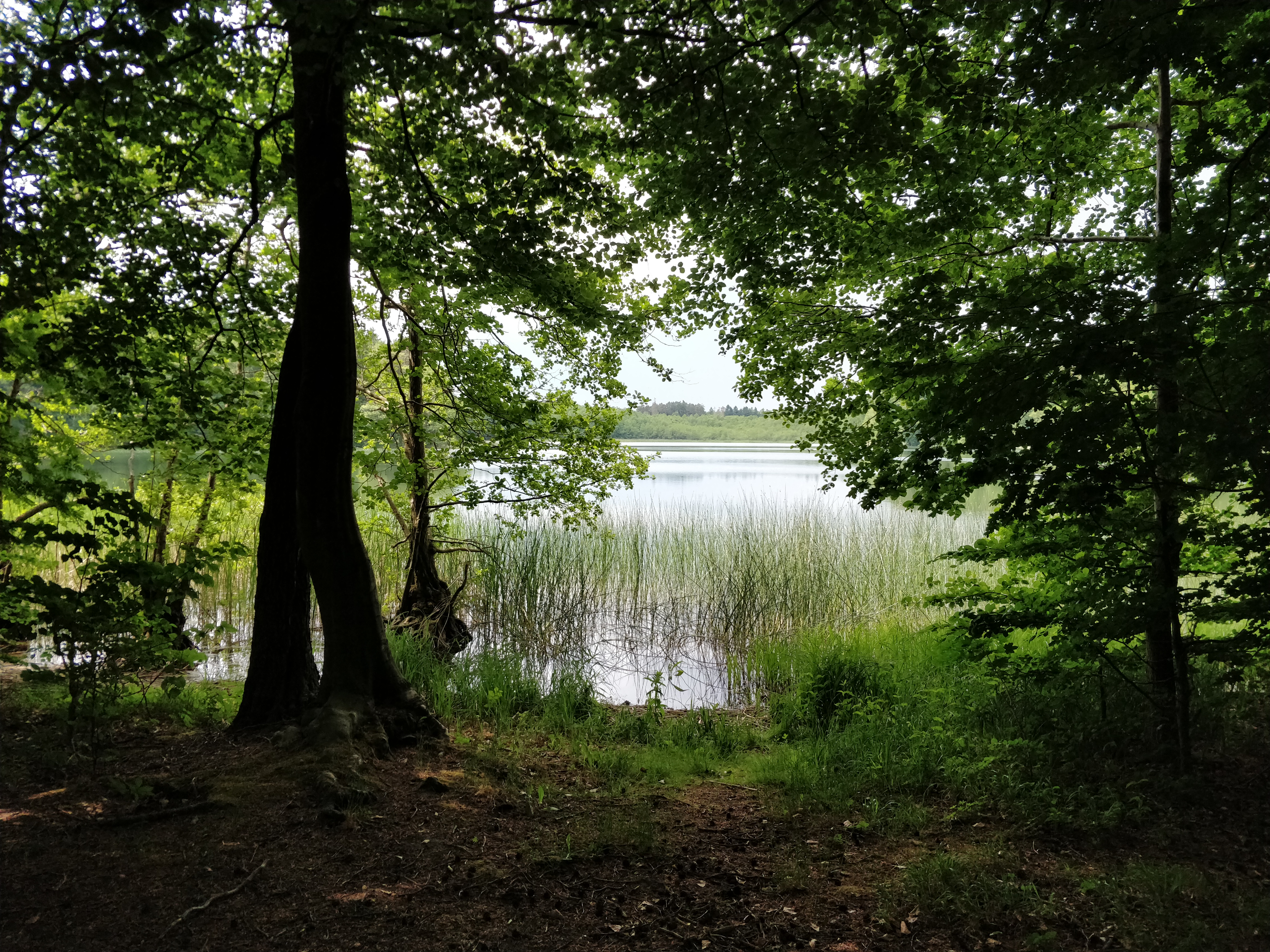 Großer Petznicksee, Ostufer neben der ehemaligen Badestelle; an dieser Stelle lag eine Wasserentnahmestelle für die Feuerwehr, die mittlerweile mit Binsen zugewachsen ist.